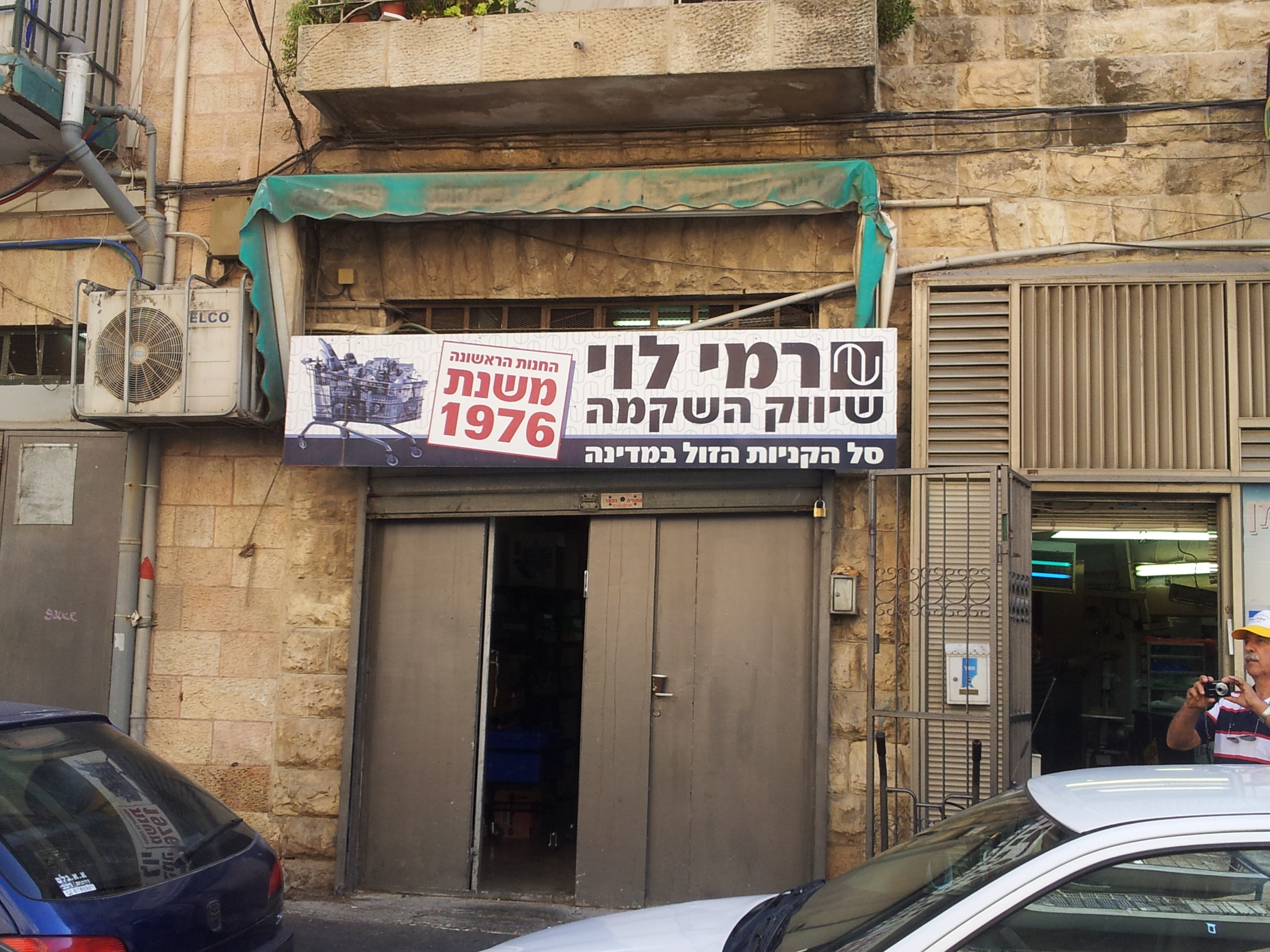 החנות הראשונה של רמי לוי